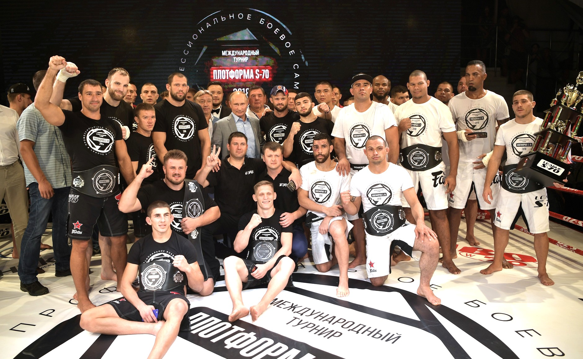 Групповое фото девятого турнира Плотформа S-70 22 августа 2018 года